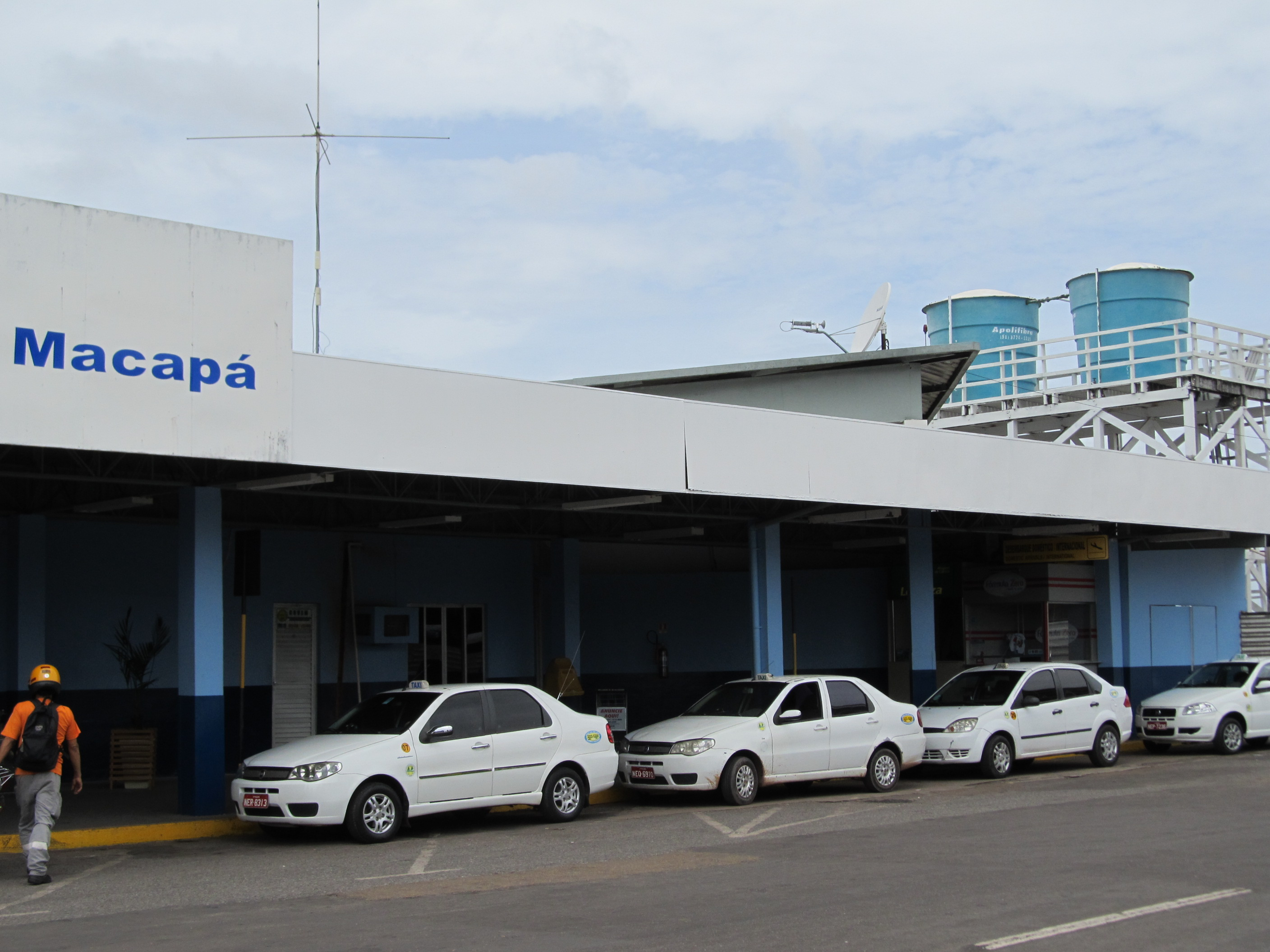 Macapá Int'l Airport, Amapá State, Brazil